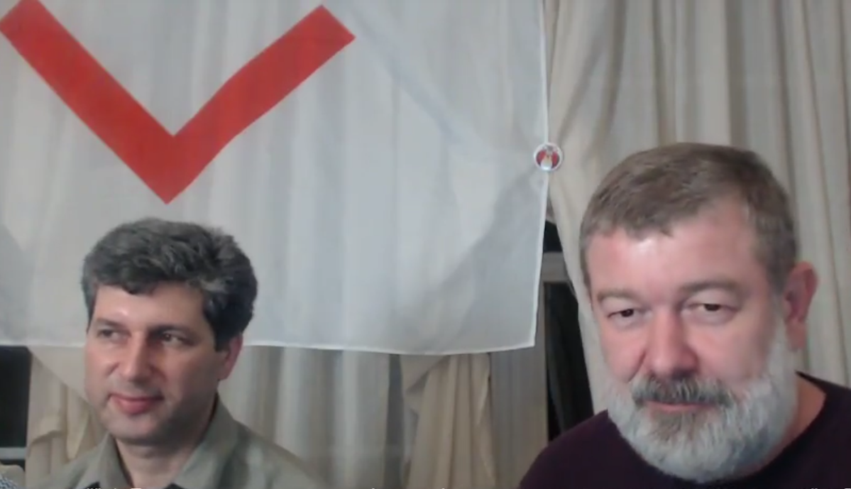 Марк Гальперин и Вячеслав Мальцев на фоне своей символики. Трансляция на YouTube-канале «Артподготовка»